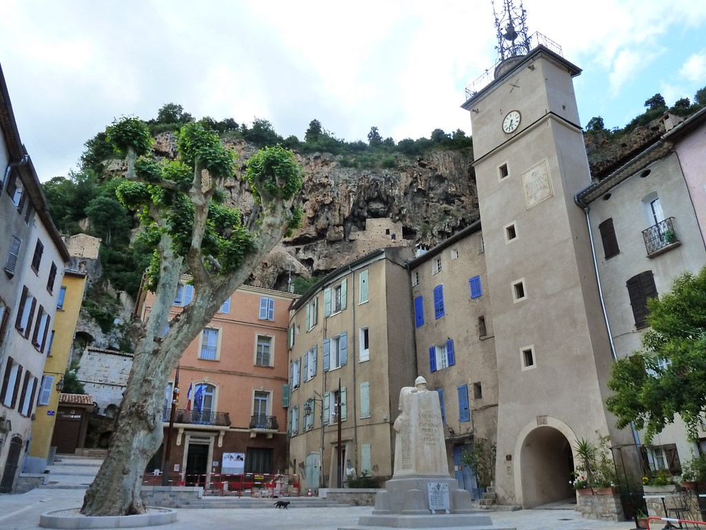 Place de la mairie de Cotignac - Var - France